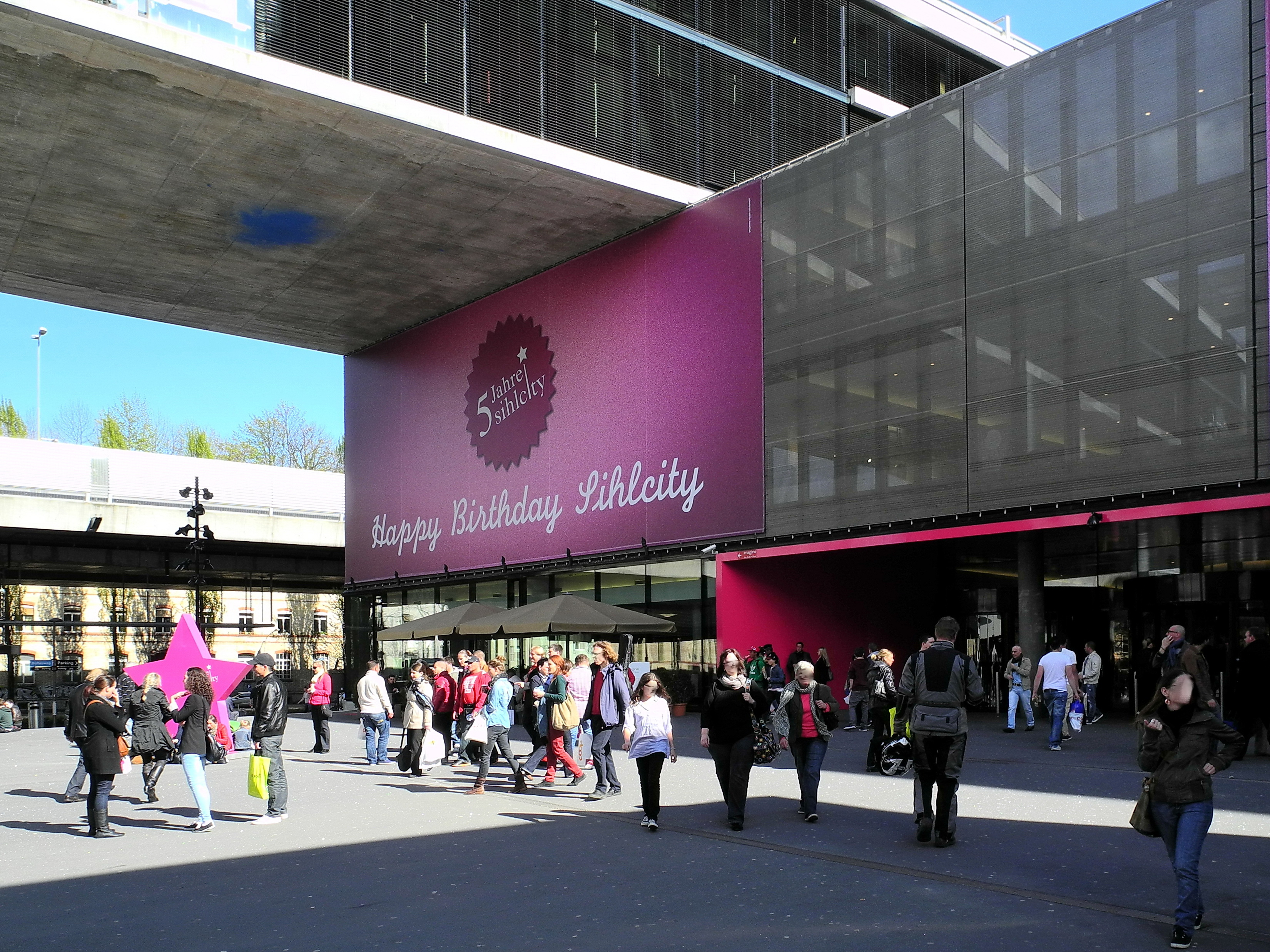 Sihlcity in Zürich (Switzerland)